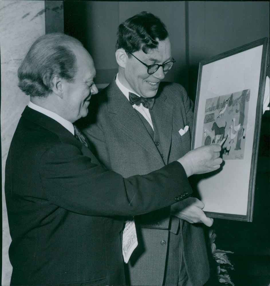 Ragnar Hoppe och Gunnar Jungmarker i samband med en årlig barnteckningsutställning på Nationalmuseum arrangerad i samarbete med Folket i Bild. Bilden infördes i Svenska Dagbladet 1948-05-28 sid 7 (